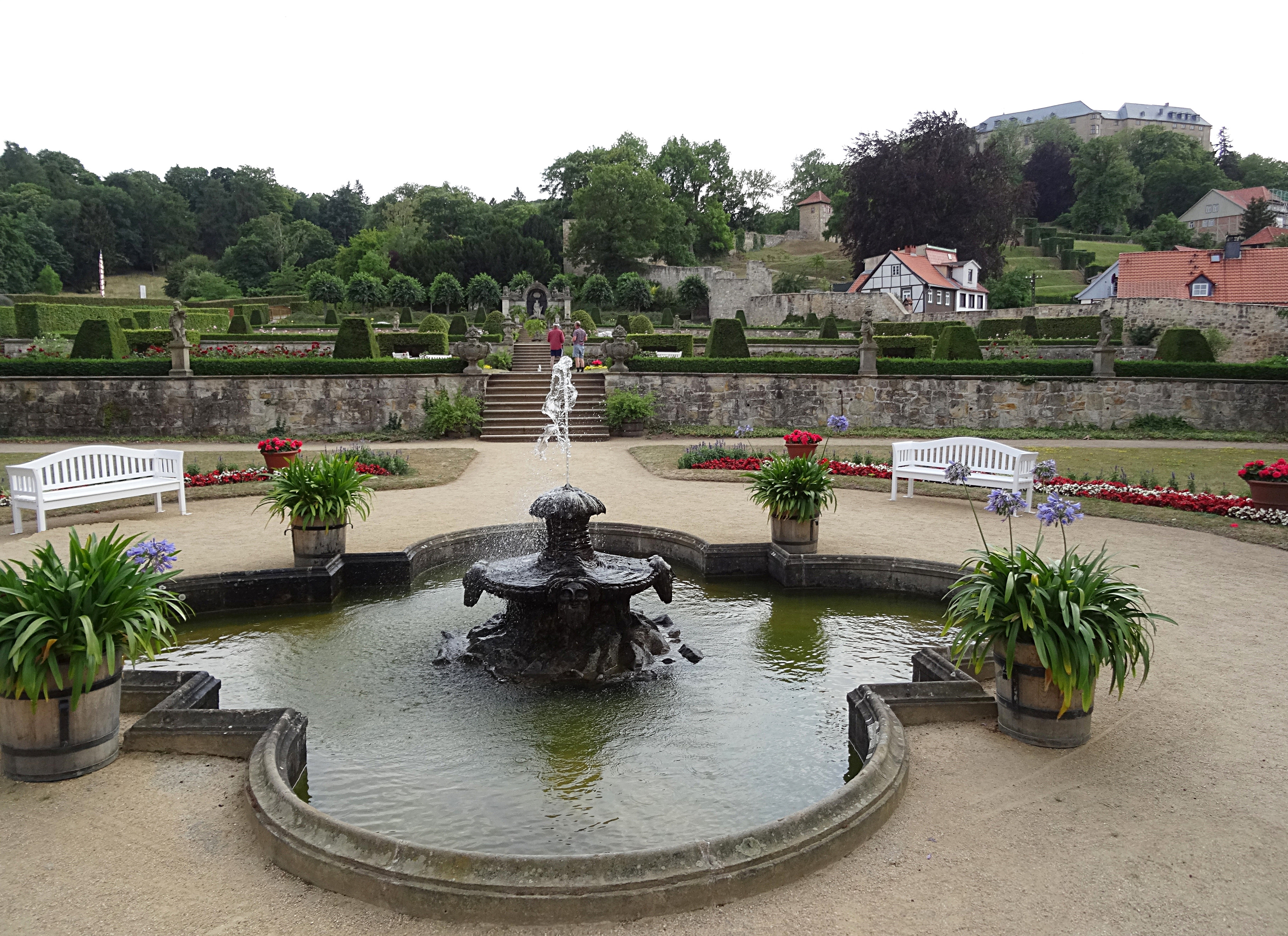 Die Barocken Gärten am Schlossberg in Blankenburg